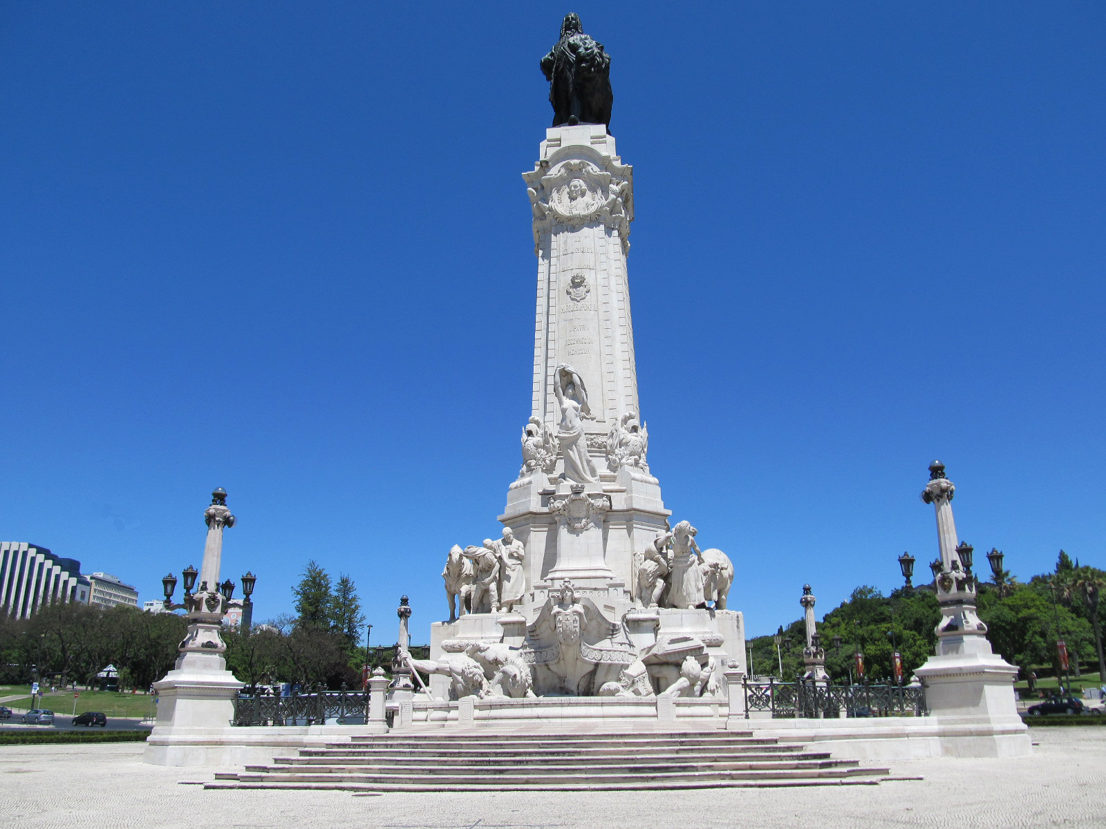 Lisboa (Lisbon) Portugal (12)